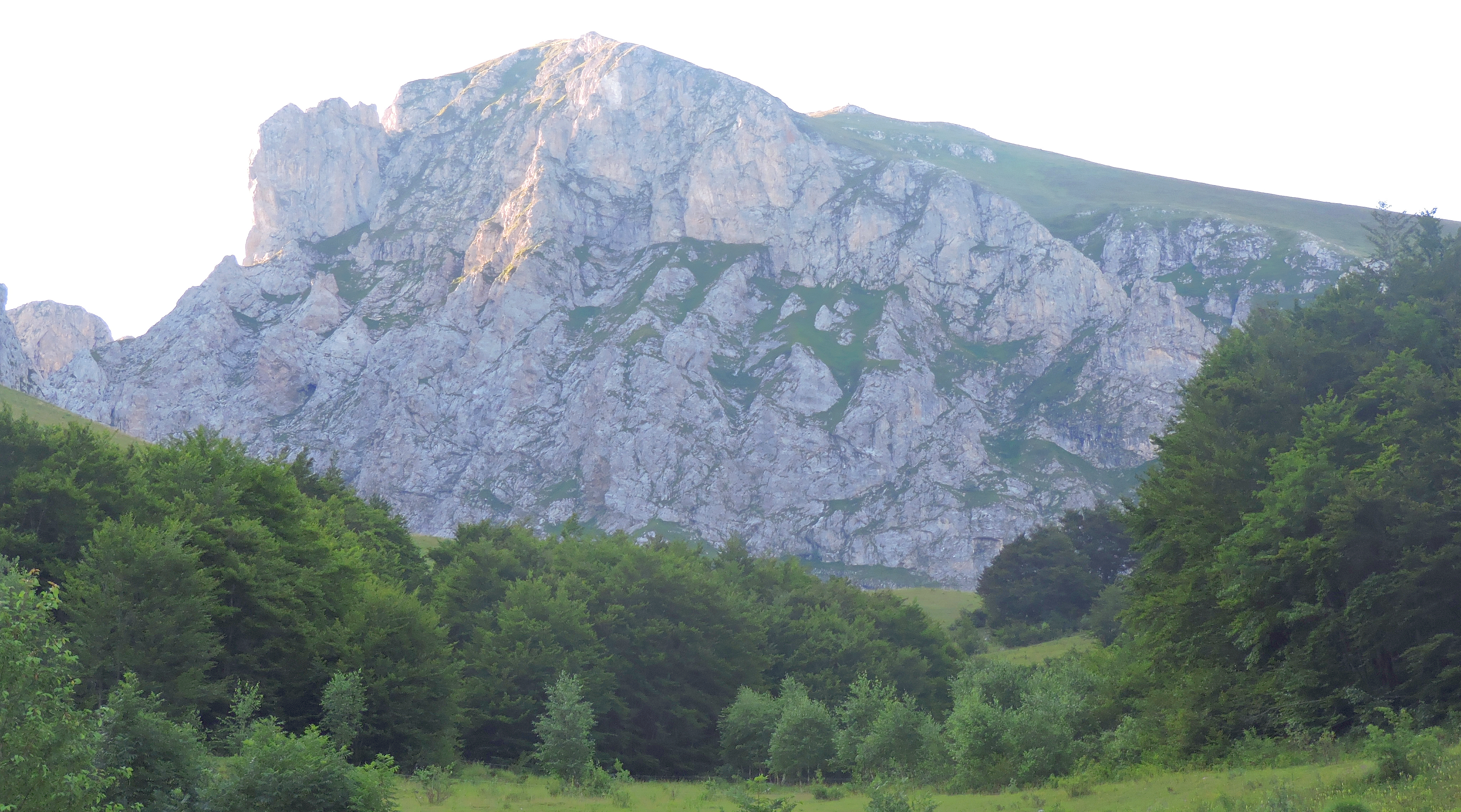 Cima della Fascia (Alpi Liguri): la parete rivolta verso il vallone del Cros